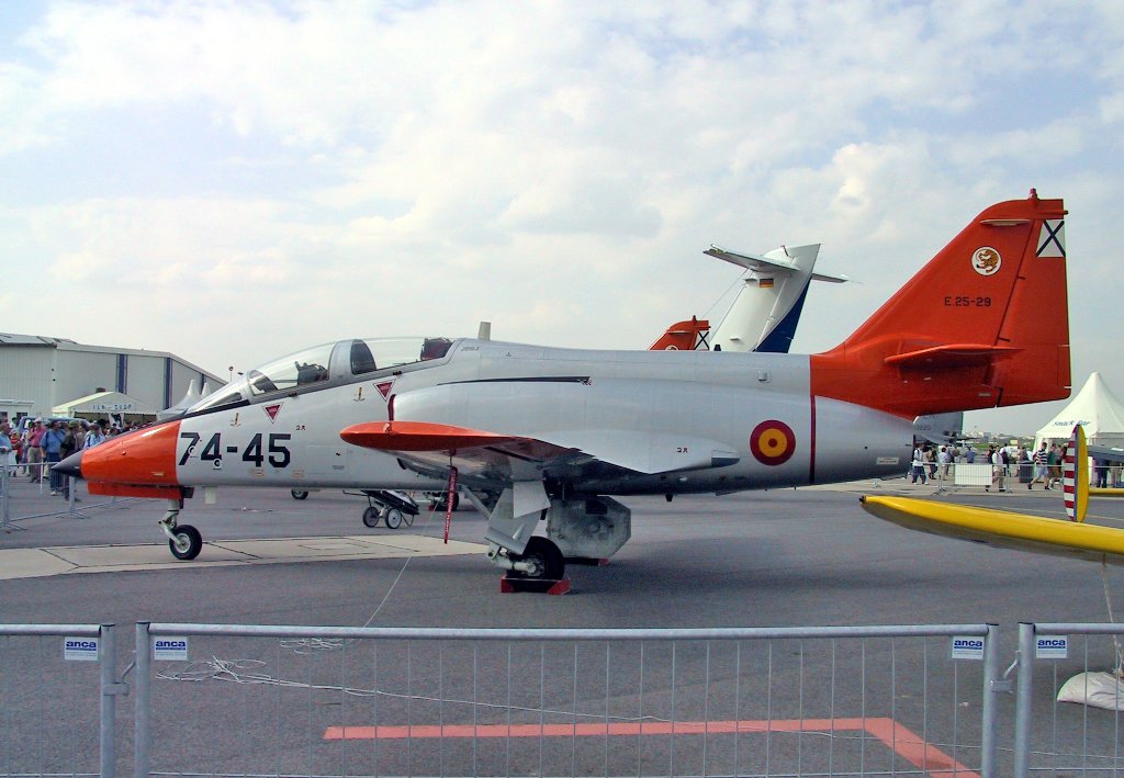 Eine CASA C-101 der spanischen Luftwaffe auf der ILA 2002.